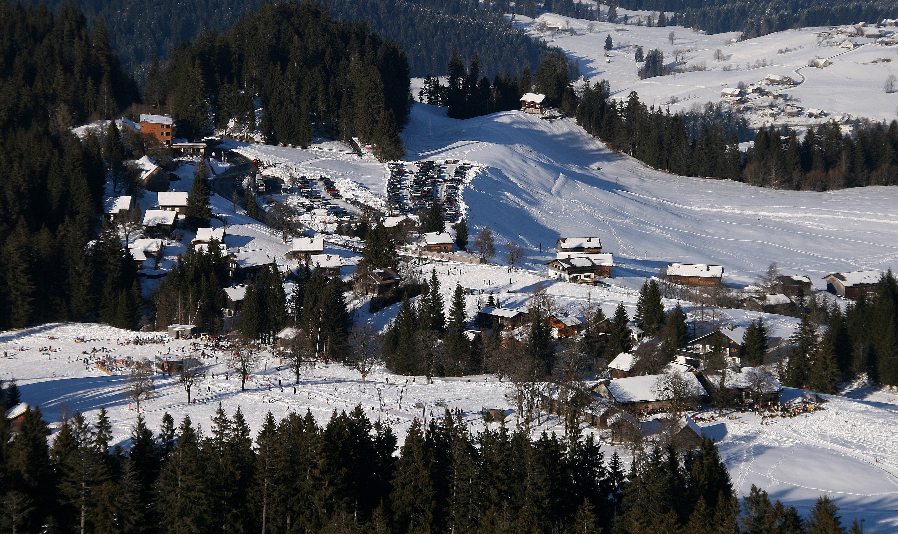 Bödele, im Vordergrund links der Lift Oberlose, rechts die Meierei. Blick von der Bergstation Lanklift.